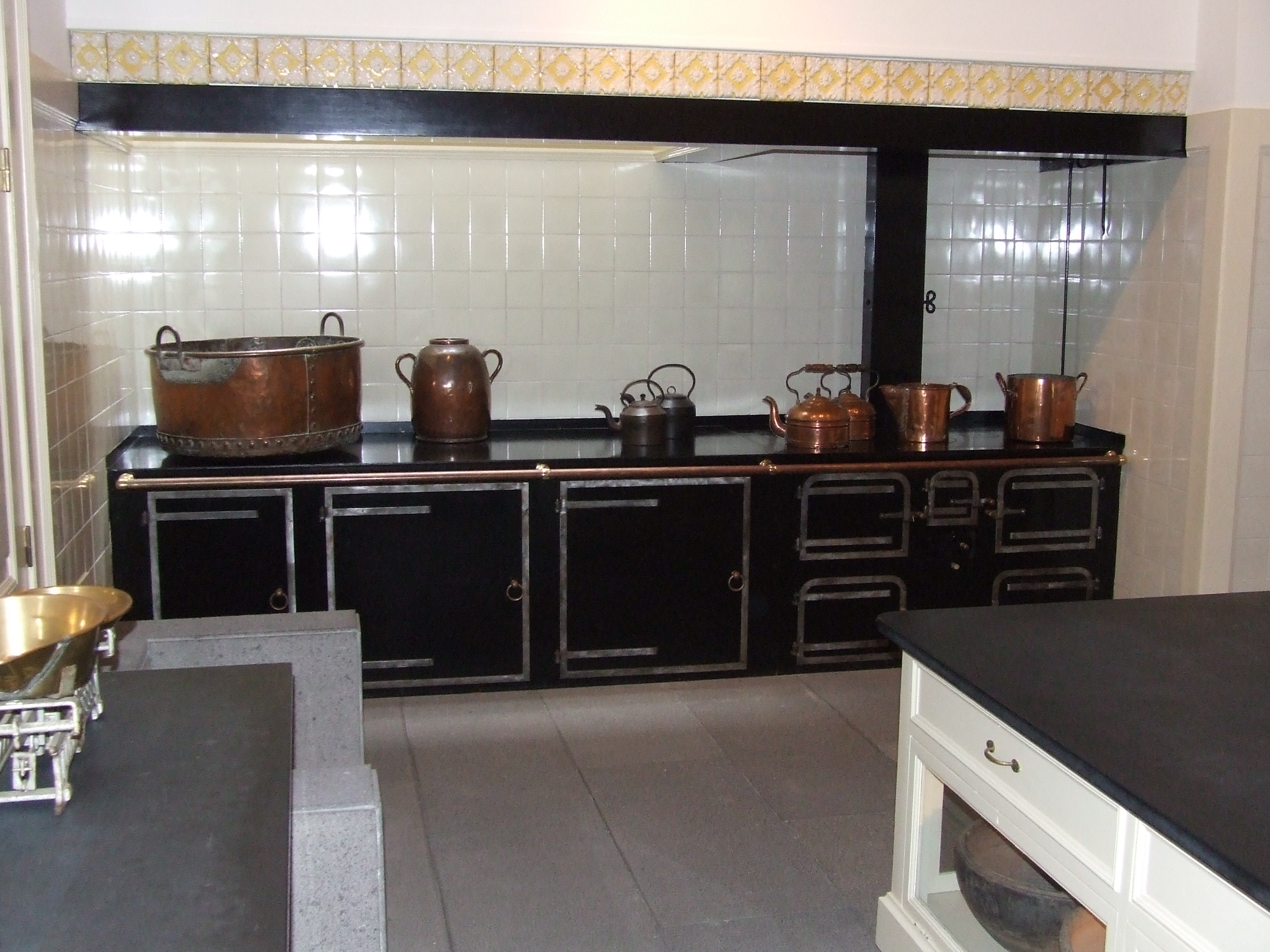 Madeira - Funchal - Frederico de Freitas House Museum